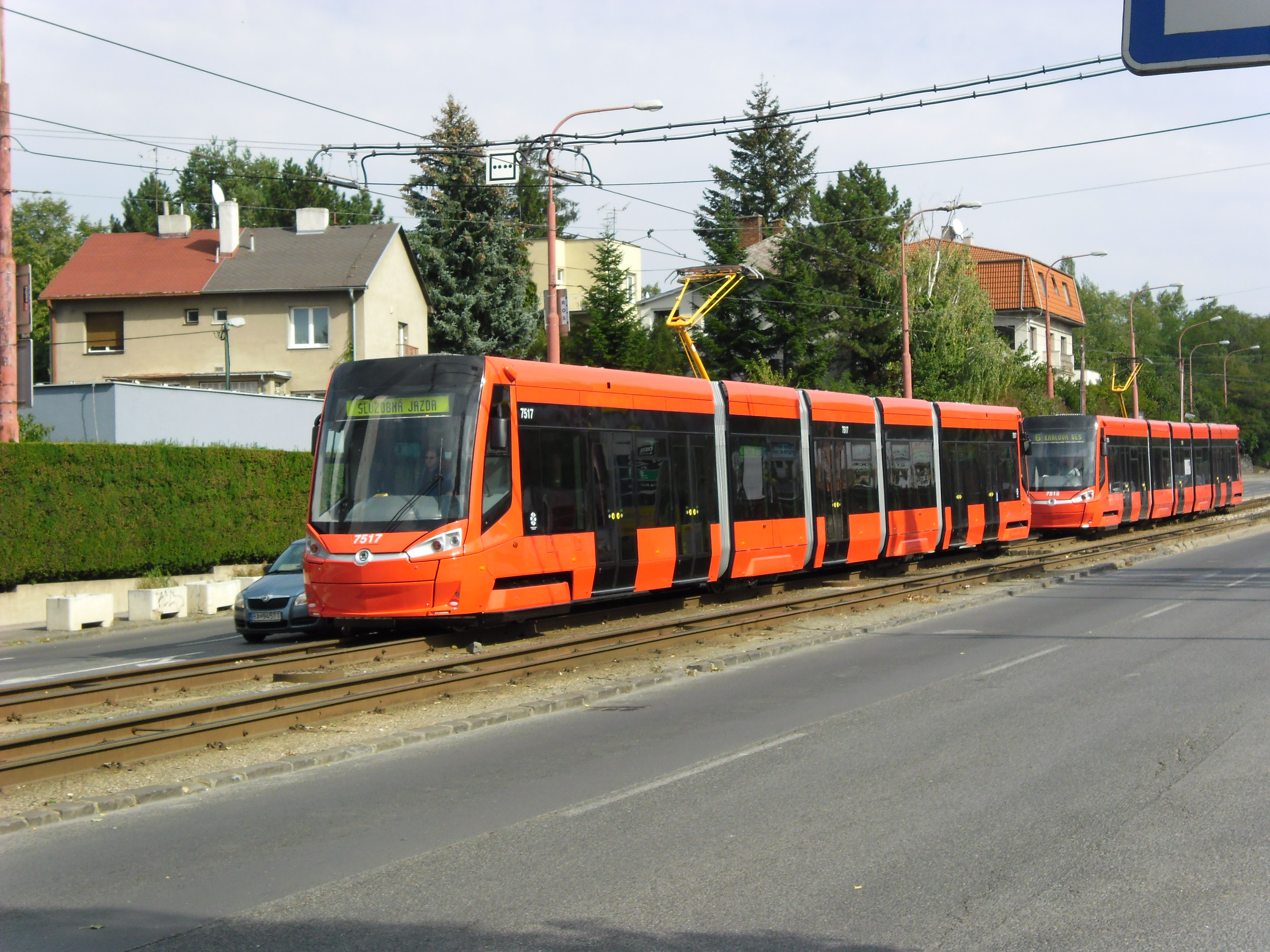 Električka Škoda 30 T, ev. č. 7517